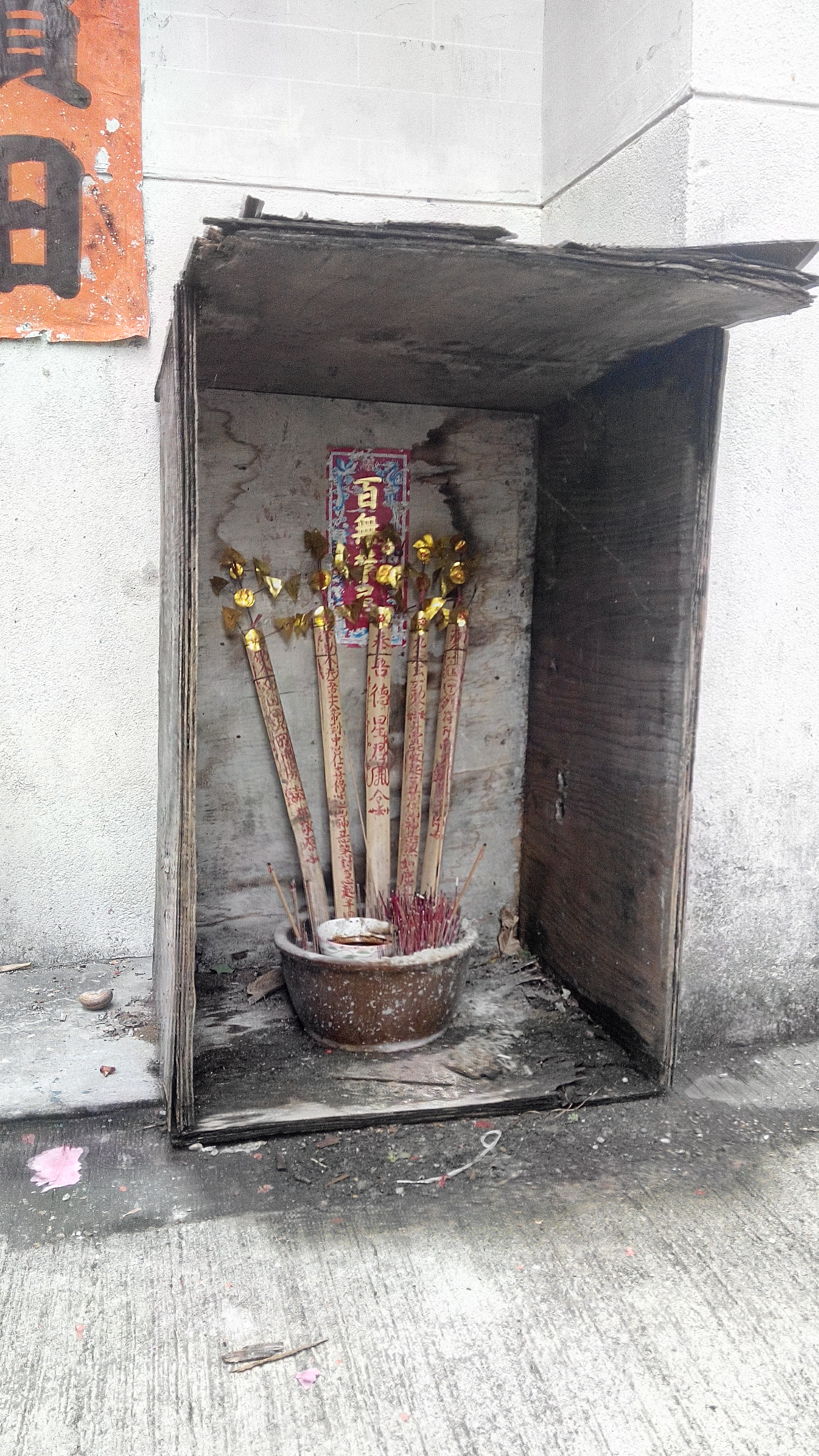 置於布心排協天宮外的「躉符」竹簽